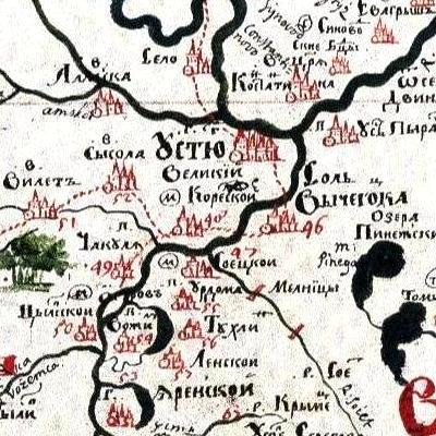 Часть Карты Перми Великой с городом Сольвычегодском конца XVII века из "Чертежной книги Сибири, составленной тобольским сыном боярским Семеном Ремезовым в 1701 г.", - СПБ, 1882